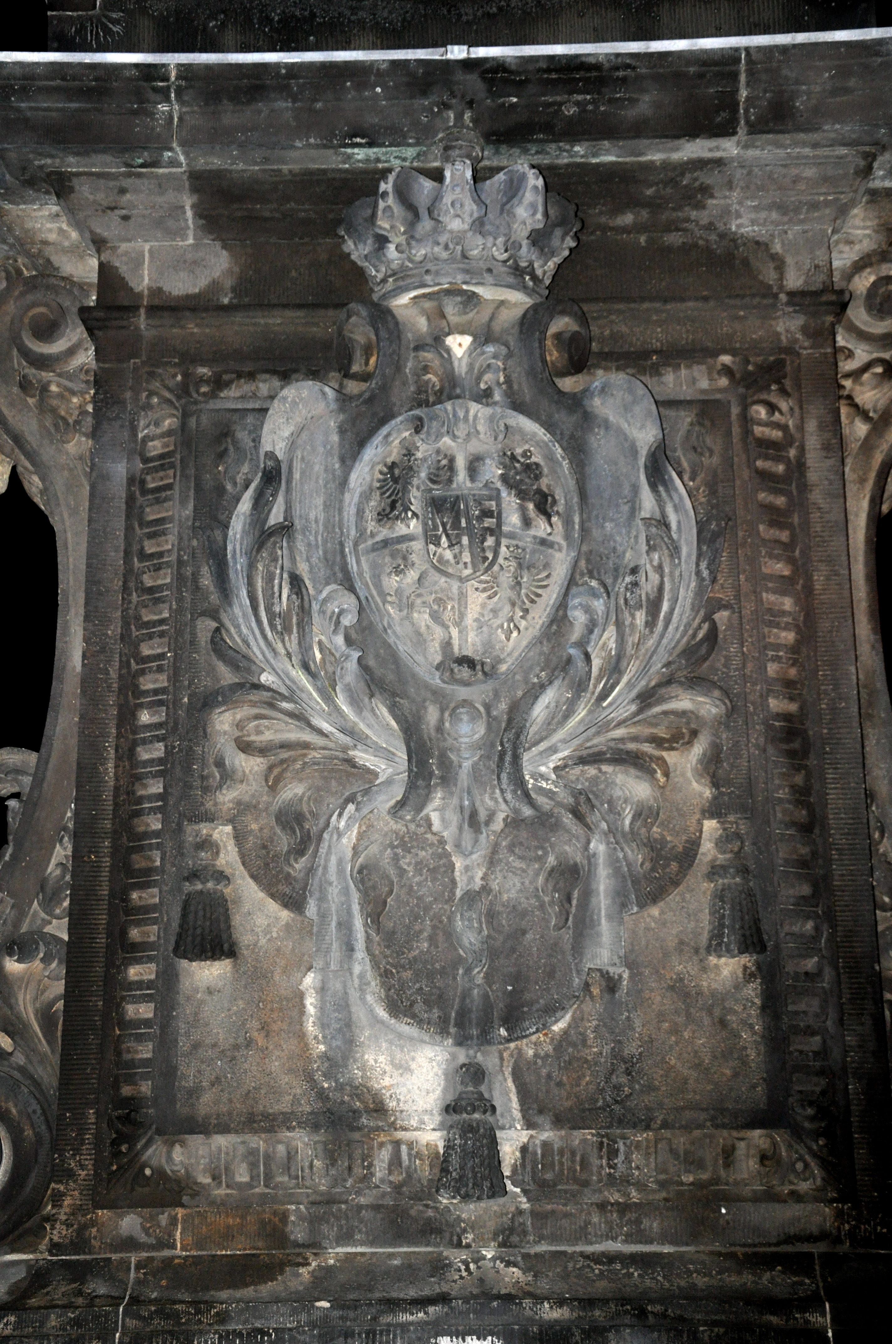 Dresden, Innere Neustadt, Goldener Reiter, Wappen Augusts des Starken am Sockel